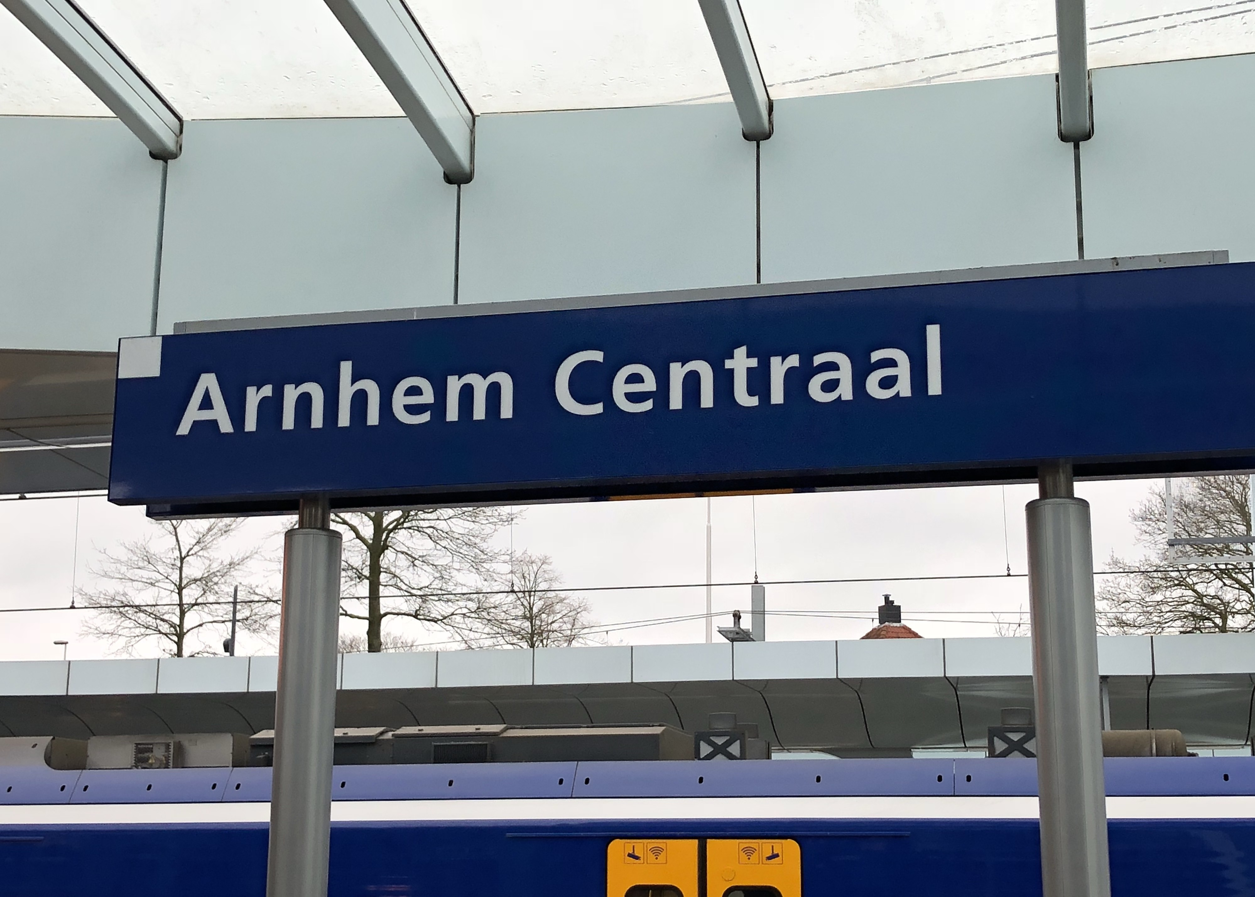 Stationsbord Arnhem Centraal